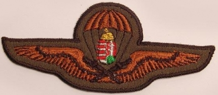 MH Legénységi ejtőernyős állományjelző